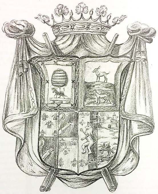 Escudo de la pedanía antequerana de Cartaojal. Es una obra anónima que se encuentra en la escalera del Edificio de Usos Múltiples de Cartaojal. También puede verse en la web [1]